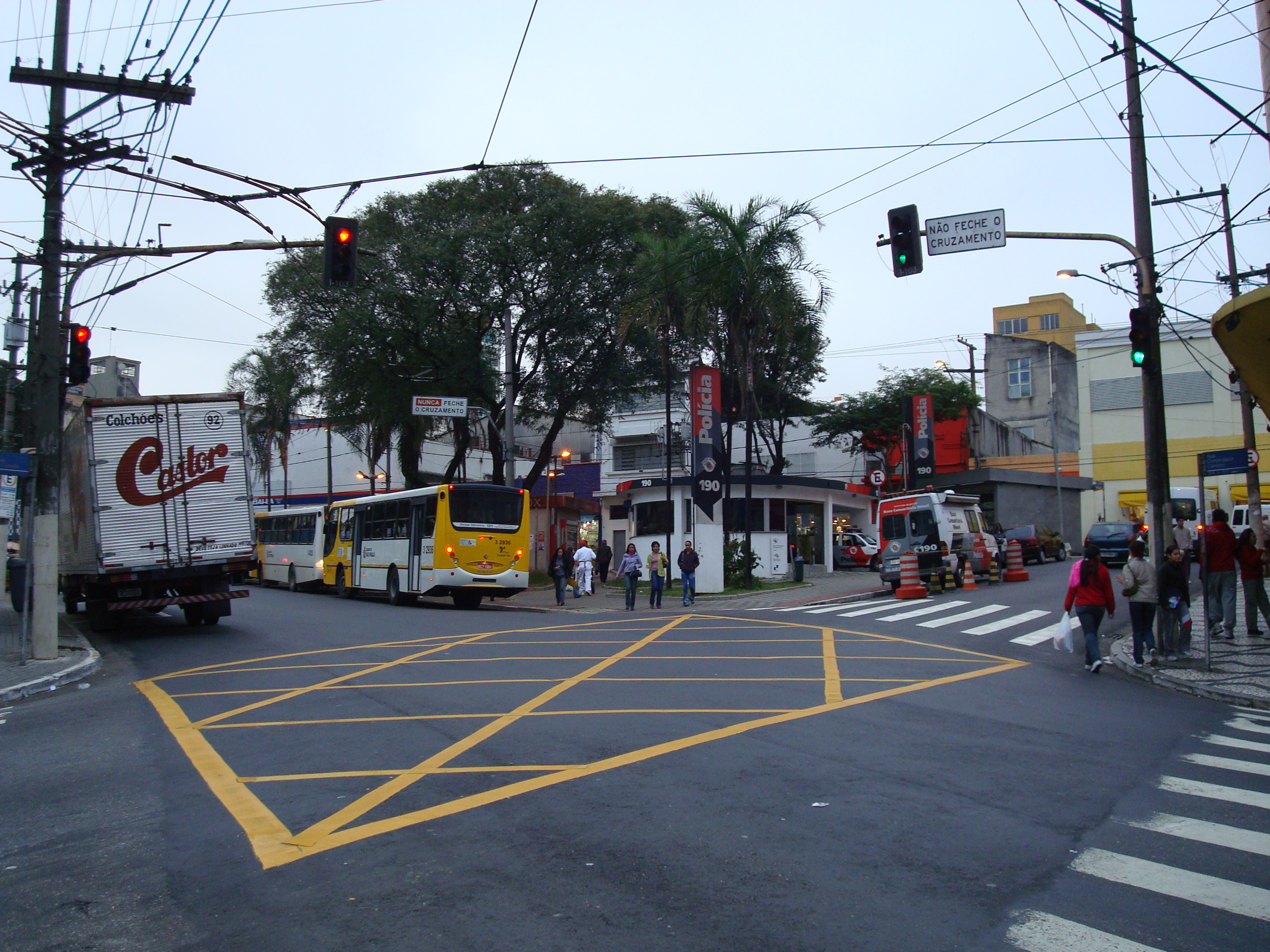 Praça 8 de Setembro - Centro do Bairro da Penha - SP